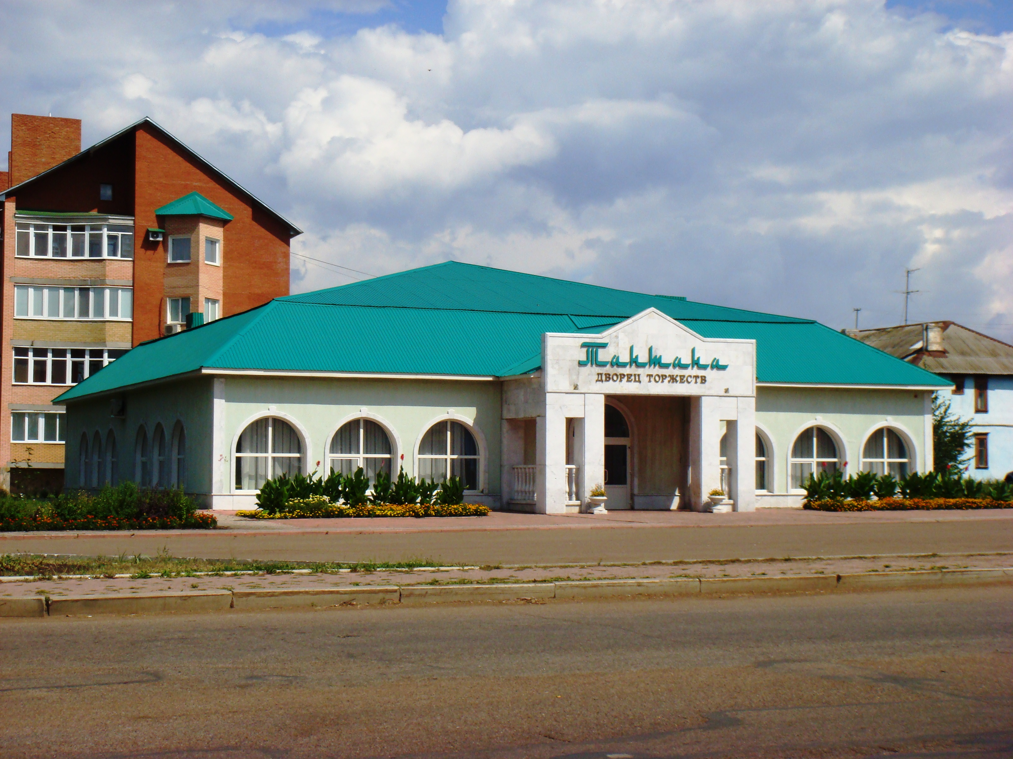 Дворец торжеств в Ишимбае, ул. Богдана Хмельницкого